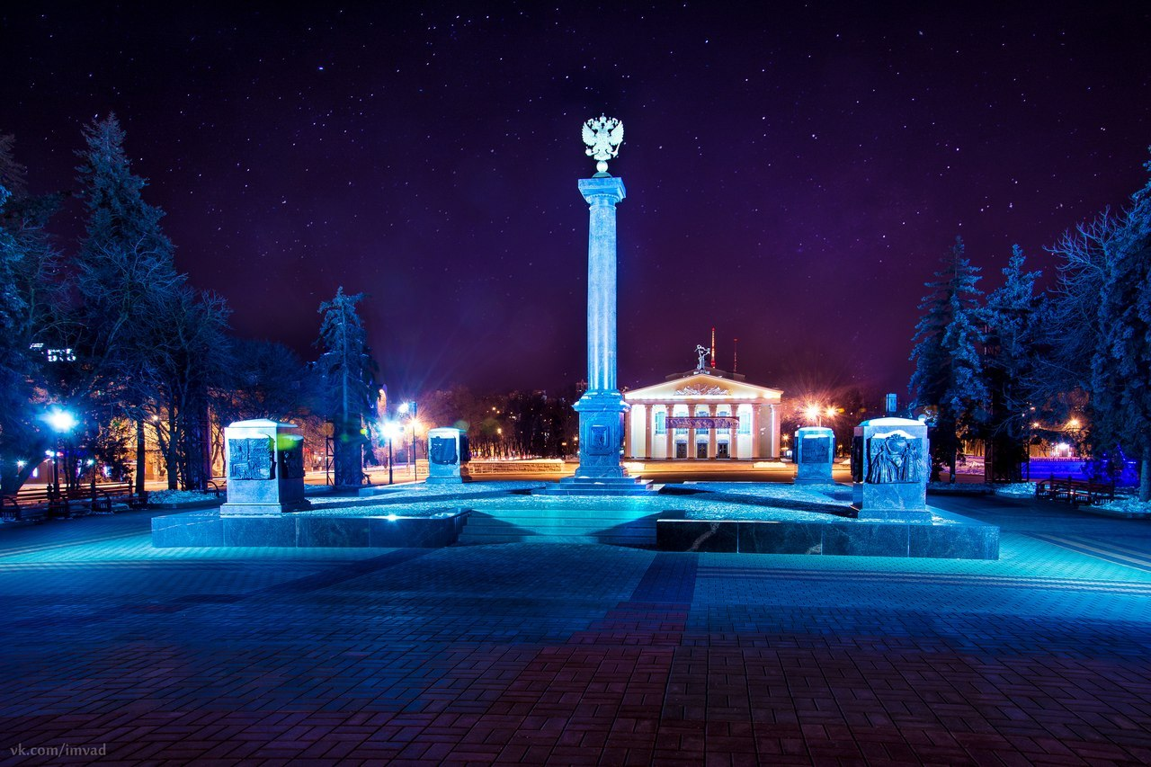 Стела Города Воинской Славы в Белгороде (2014)